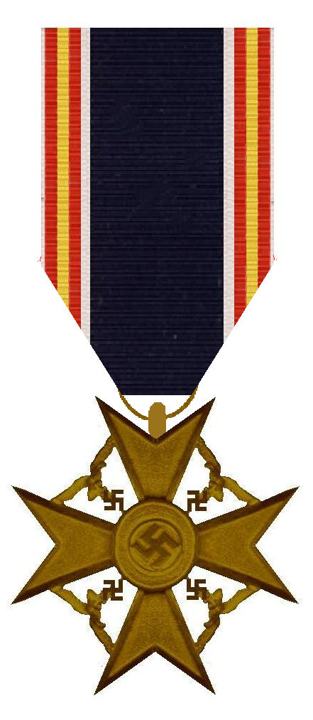 Ehrenkreuz für Hinterbliebene deutscher Spanienkämpfer